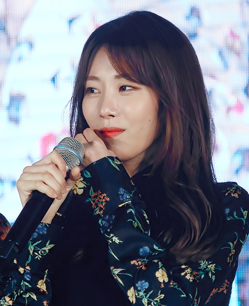 170526 안산 근로자 뮤직페스티벌 구구단 직찍